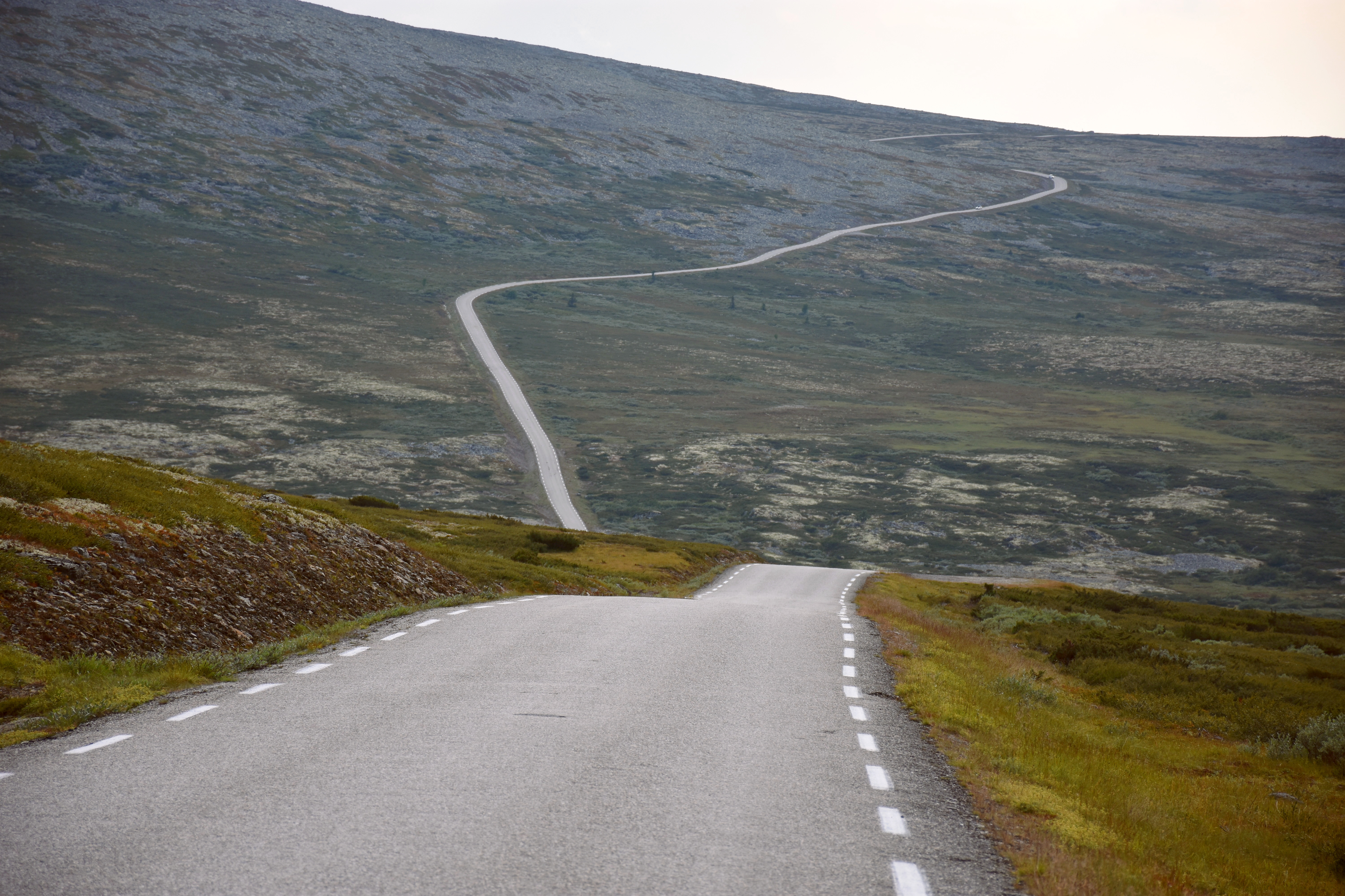 Friisvegen (fylkesvei 2204) i retning Ringebu